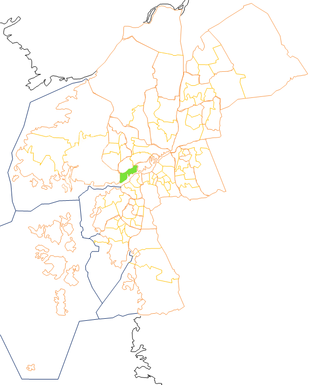 Karta som visar primärområdes belägenhet i Göteborg